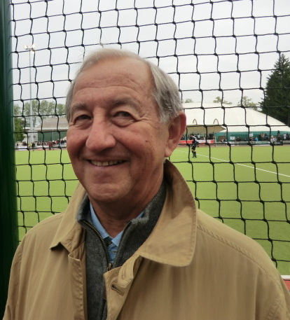 Christian Honegger en marge de la finale du championnat de France 2013 à Caluire-et-Cuire.